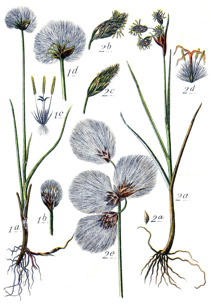 1. Eriophorum scheuchzeri Hoppe 2. Eriophorum angustifolium Honck., syn. Eriophorum polystachion L. Original Caption 1. Scheuchzer's Wollgras, Eriophorum scheuchzeri 2. Schmalblättriges Wollgras, Eriophorum polystachion